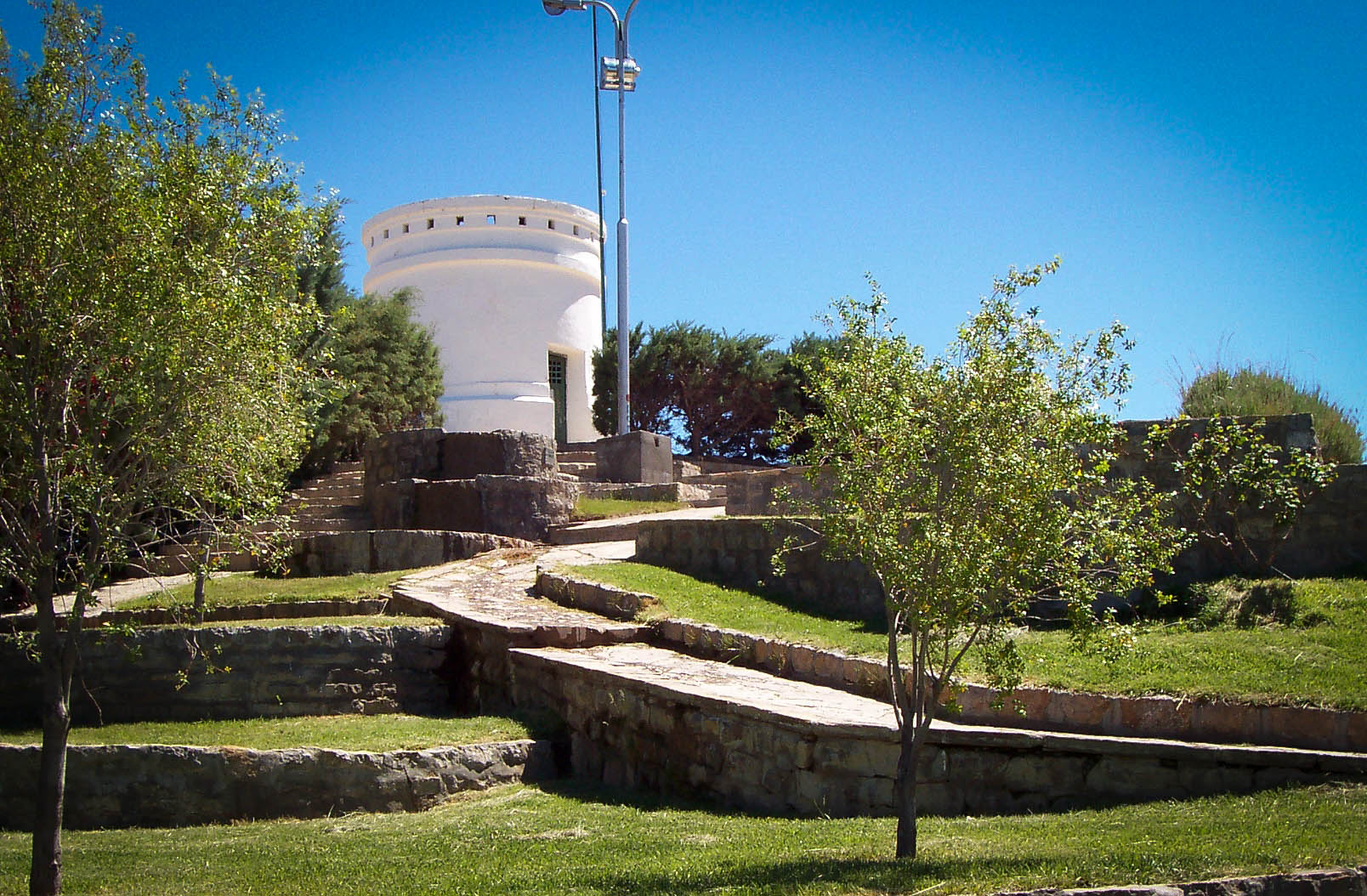 Fortín IV División situado en la ciudad de Chos Malal al norte de la Provincia del Neuquén